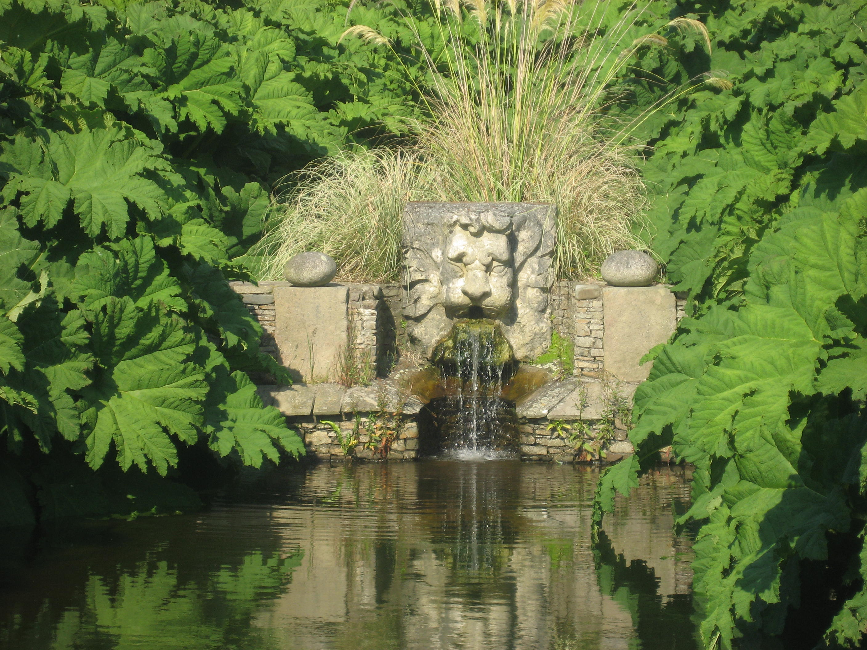 Le bassin des gunneras et sa tête de lion, Jardin botanique de Vauville (Manche), Normandie, France.